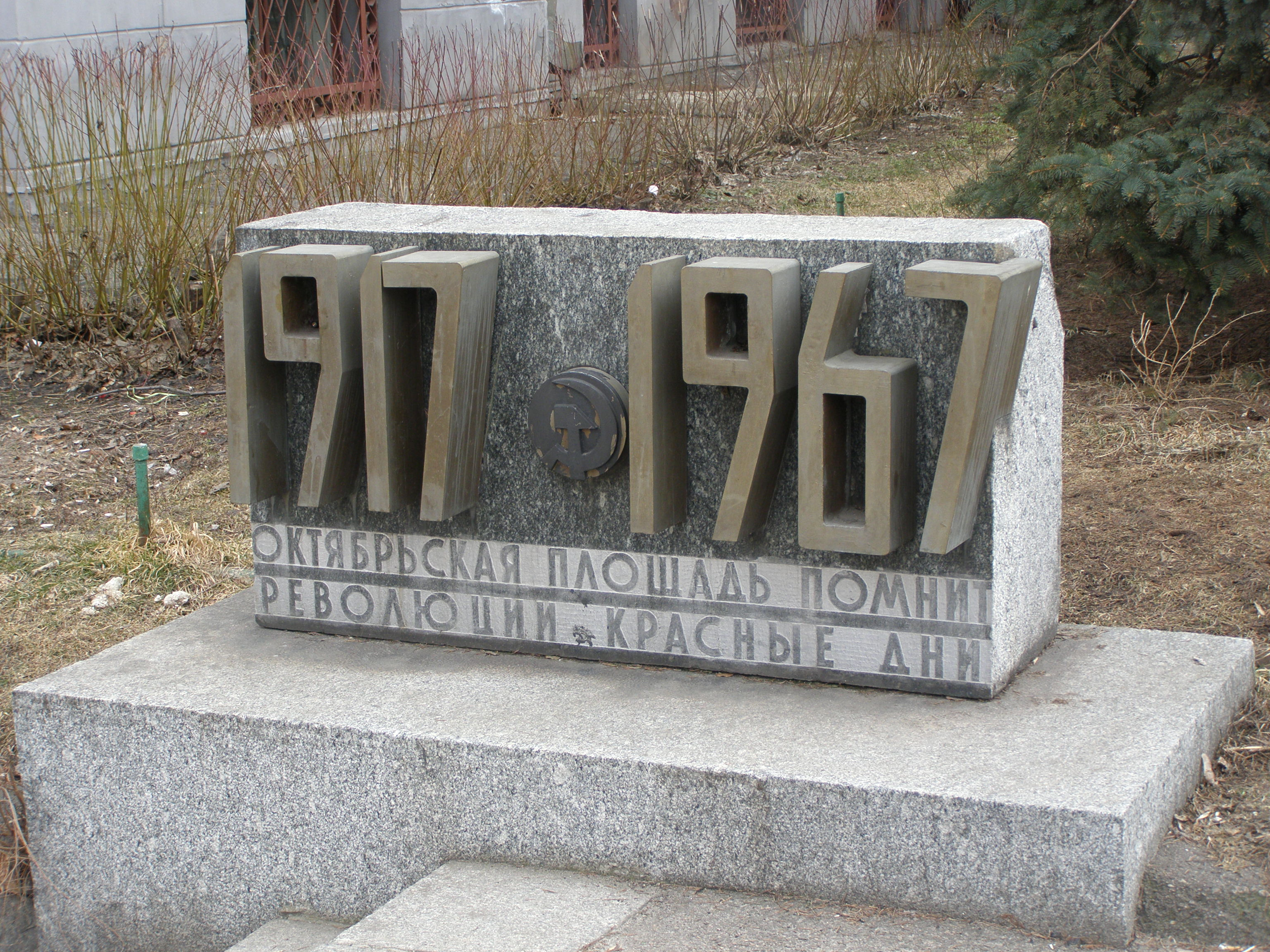 Памятный камень